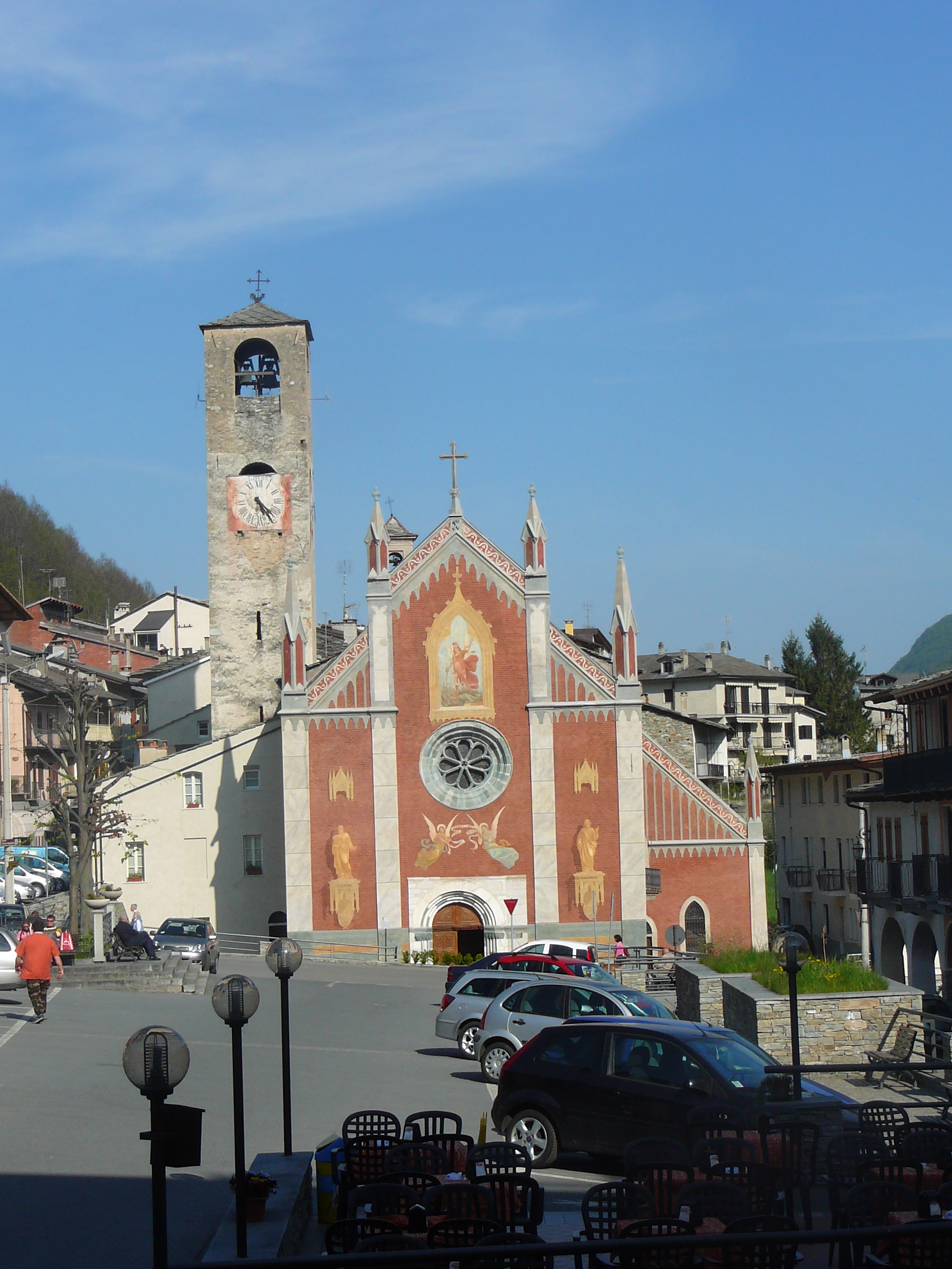 Sampeyre (provincia di Cuneo): piazza della Vittoria